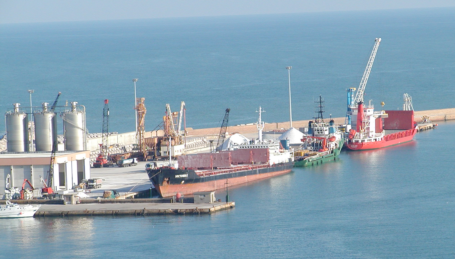 Die Hafen